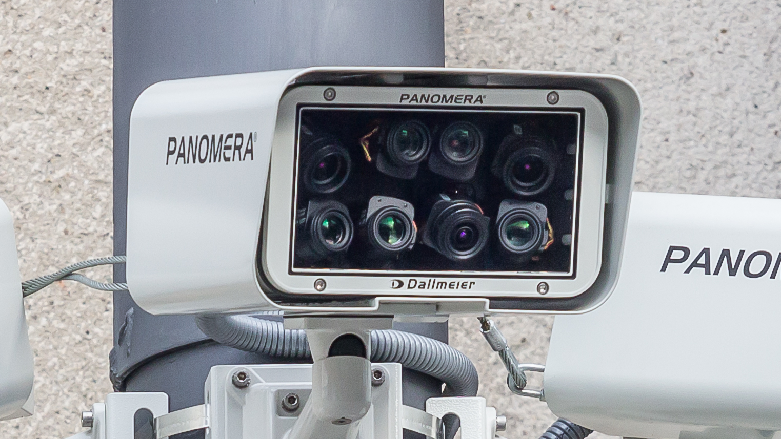 Überwachungskameras Bahnhofsvorplatz Köln. Hersteller: Dallmeier. Modell: Panomera. Jedes Kameragehäuse enthält 8 Einzelkameras